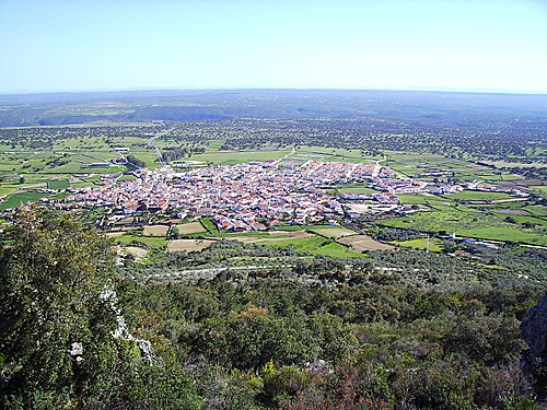 Pueblo de serradilla vista panoramica